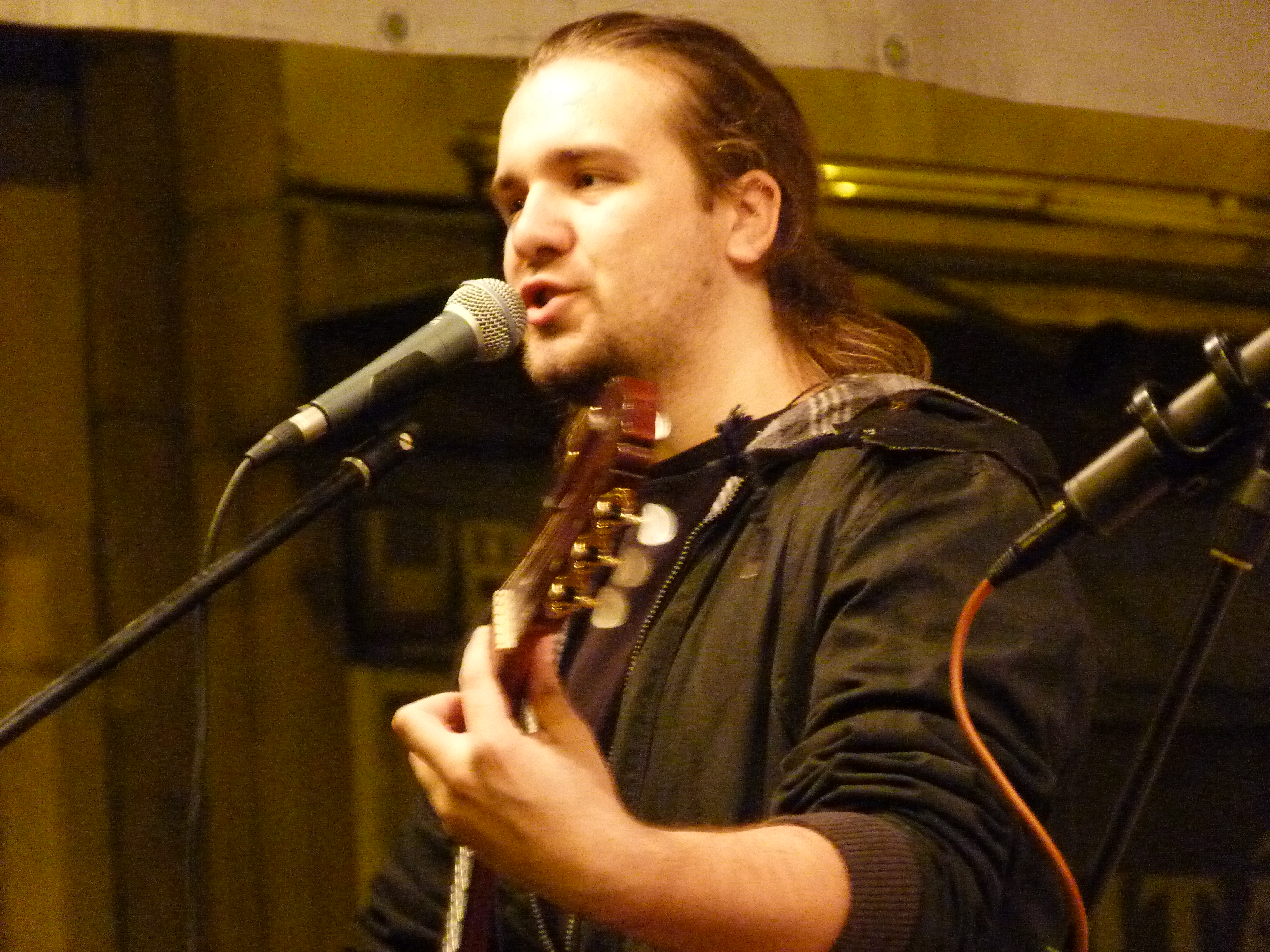 Bäck Zoltán a Kárpátia együttes tagja.